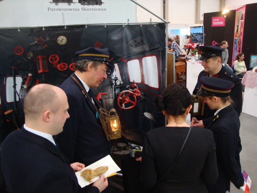 XX Jubileuszowe Targi Turystyczne w Łodzi 2014 Działacze Stowarzyszenia Miłośników Kolei